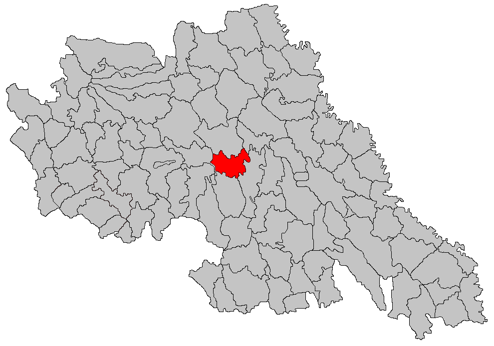 Categorie:Hărţi ale judeţului Iaşi